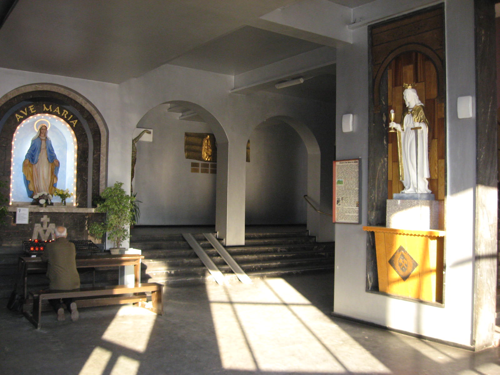 Kościół św. Kamila w Zabrzu